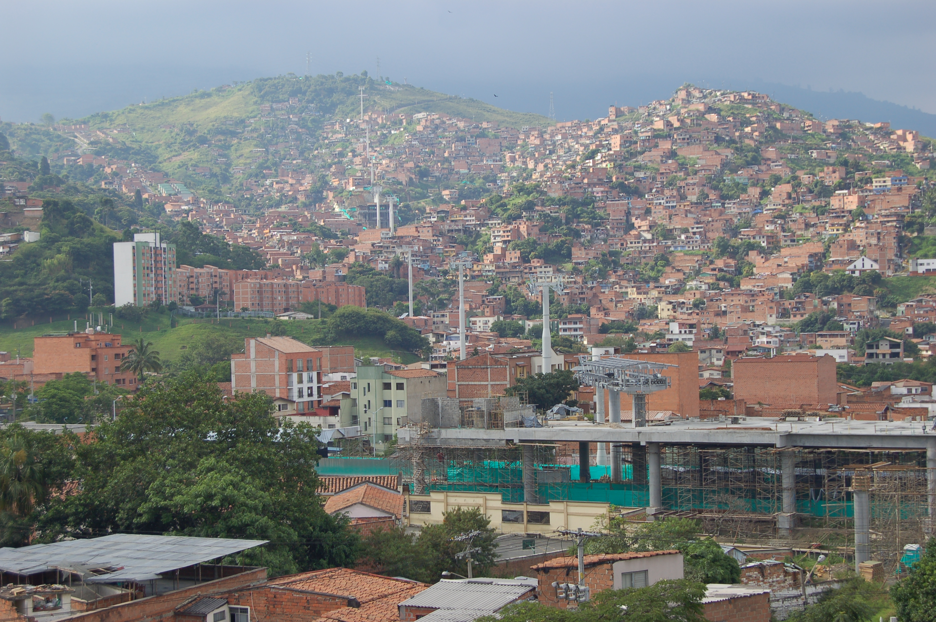 Comuna 13 San Javier de Medellin, Colombia.